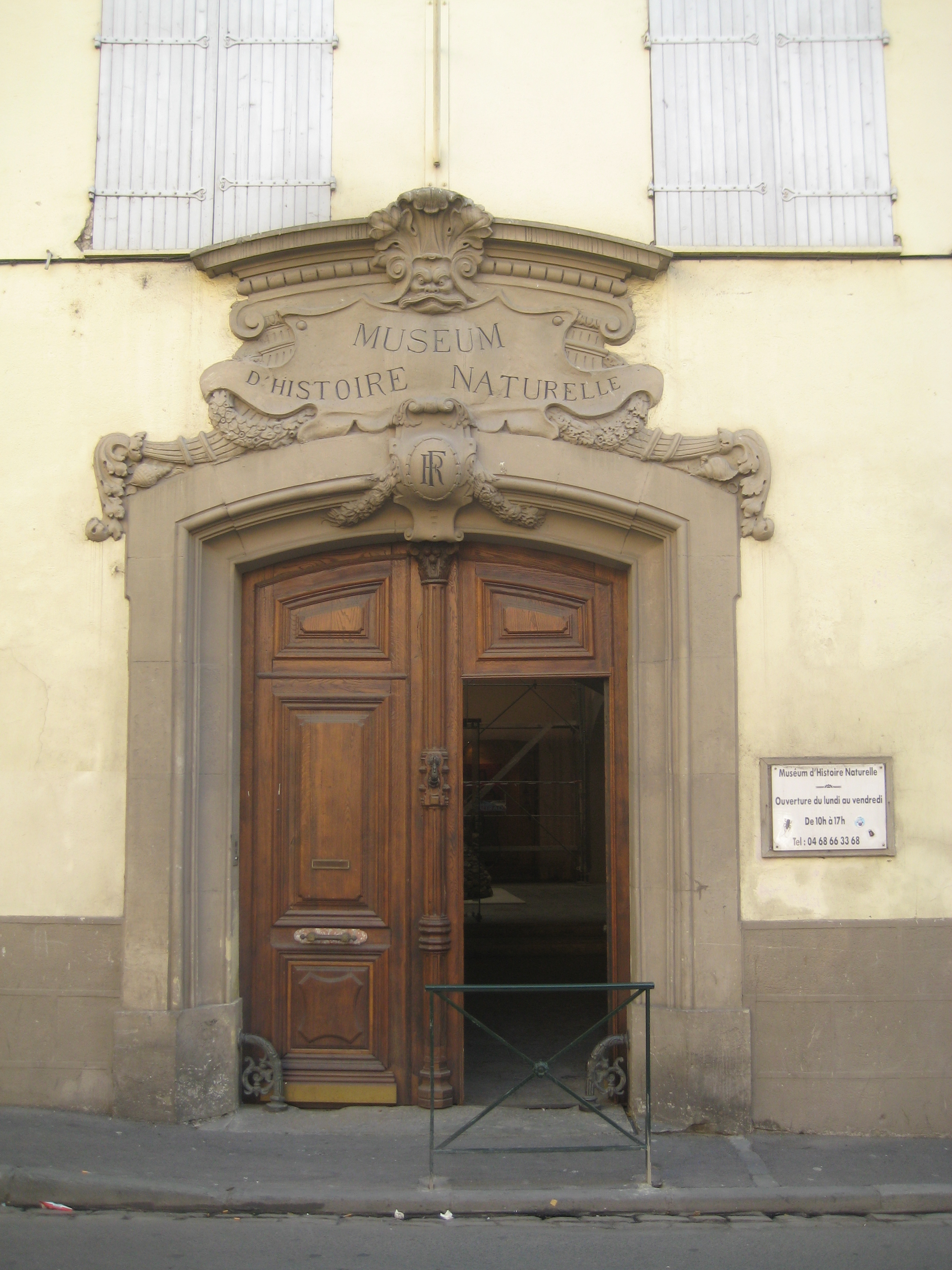 Muséum d'histoire naturelle de Perpignan .